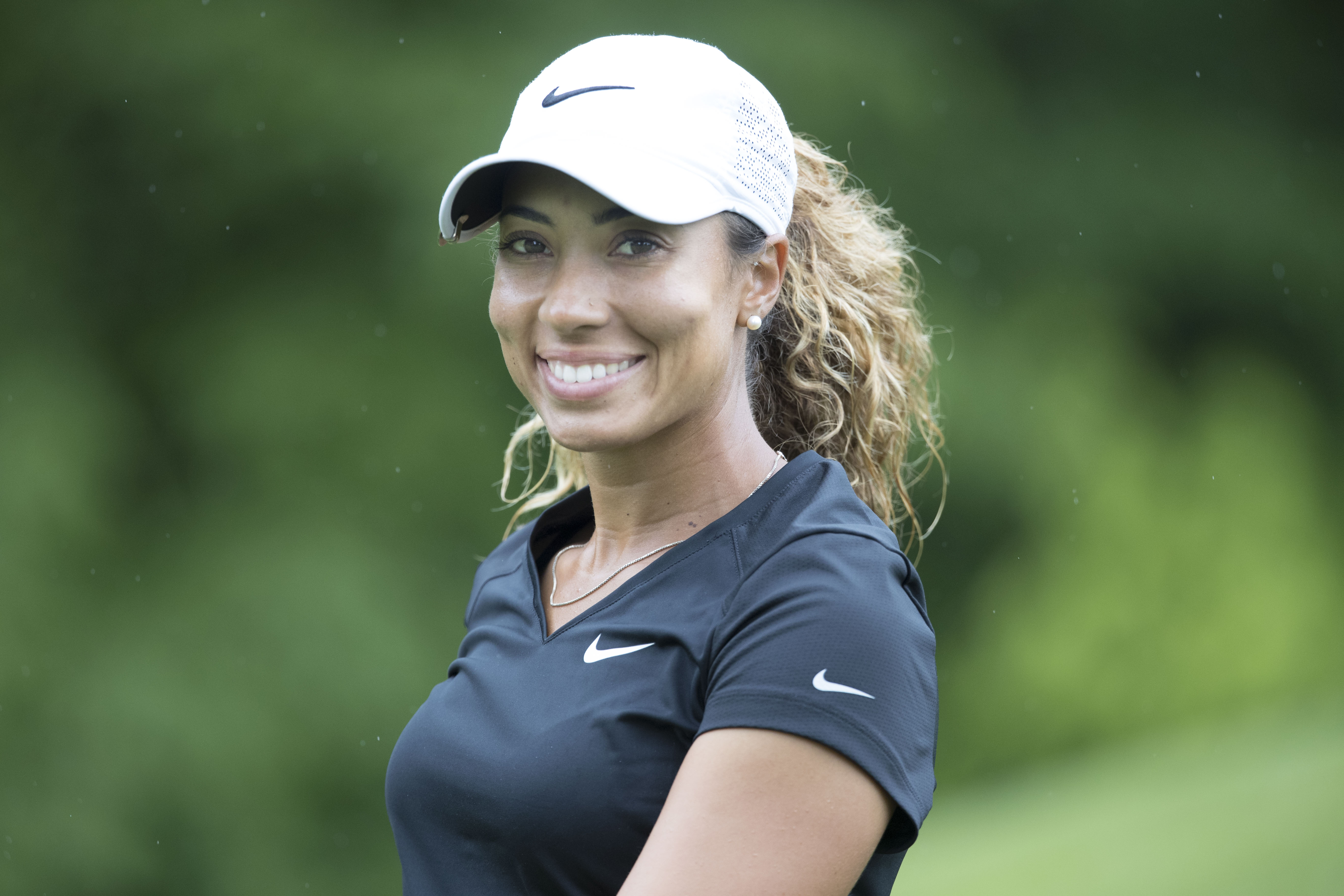 LPGA Kingsmill 2016